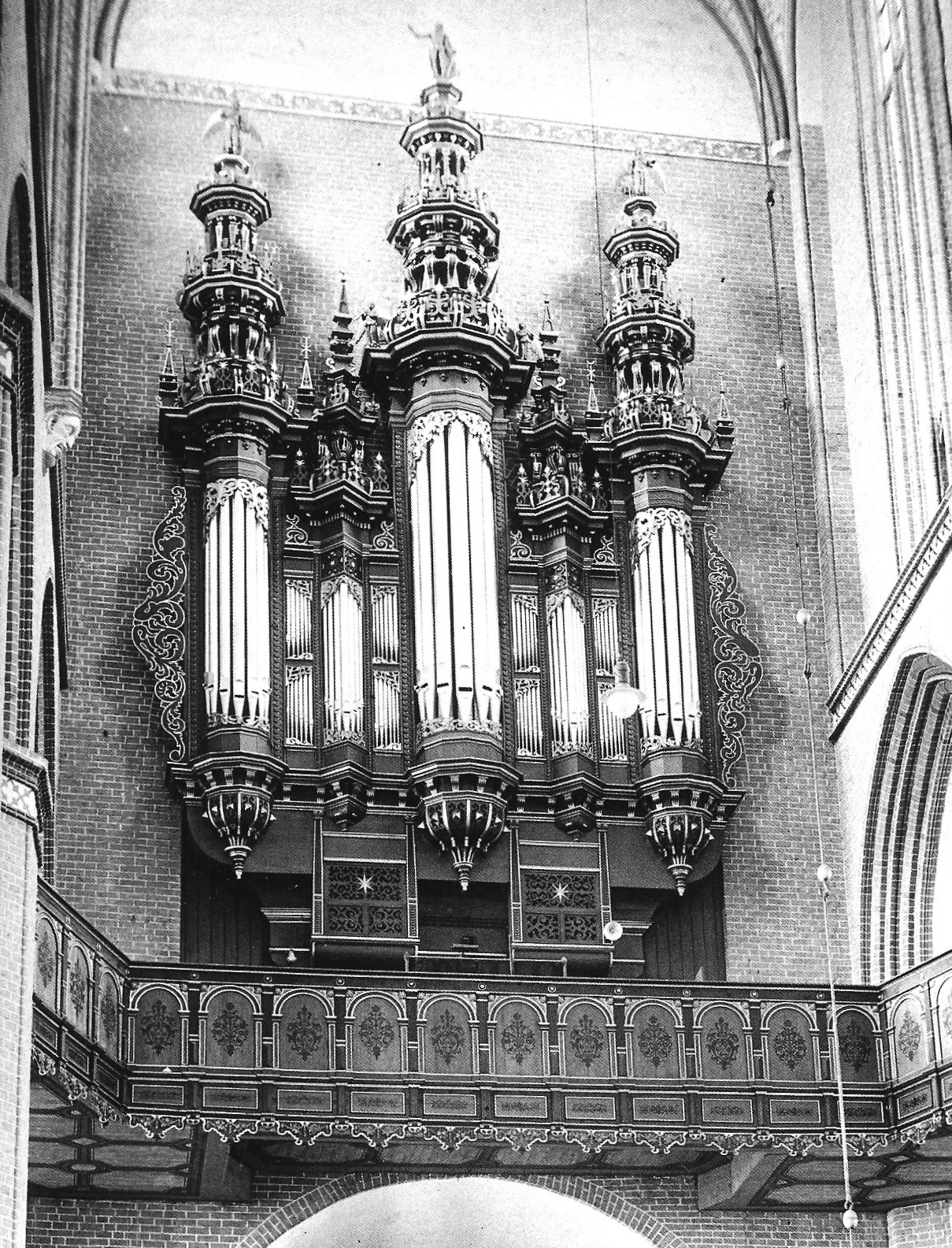 Wismar, St. Georgen: Orgel im April 1934